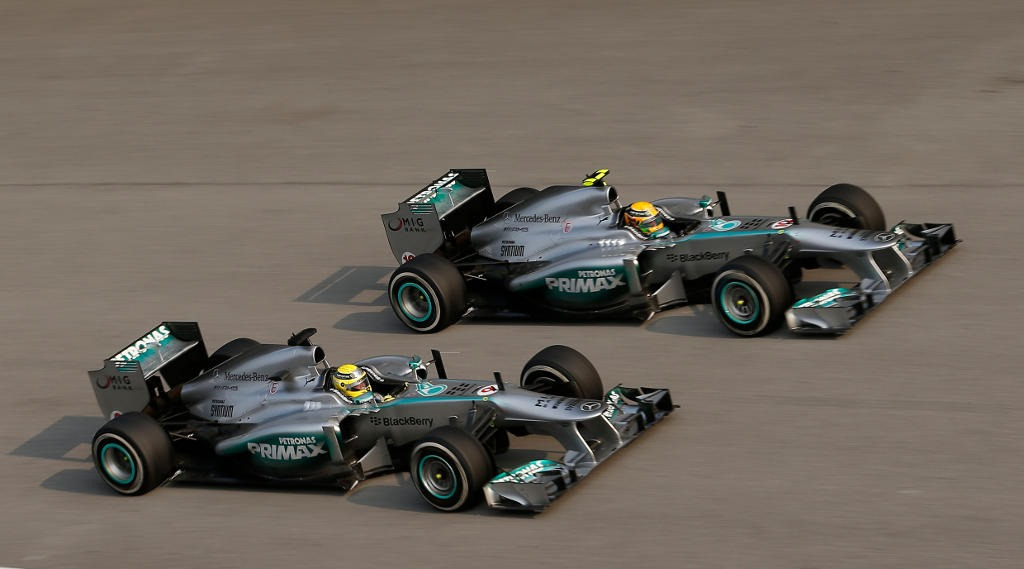 Hamilton y Rosberg en el Gran Premio de Malasia